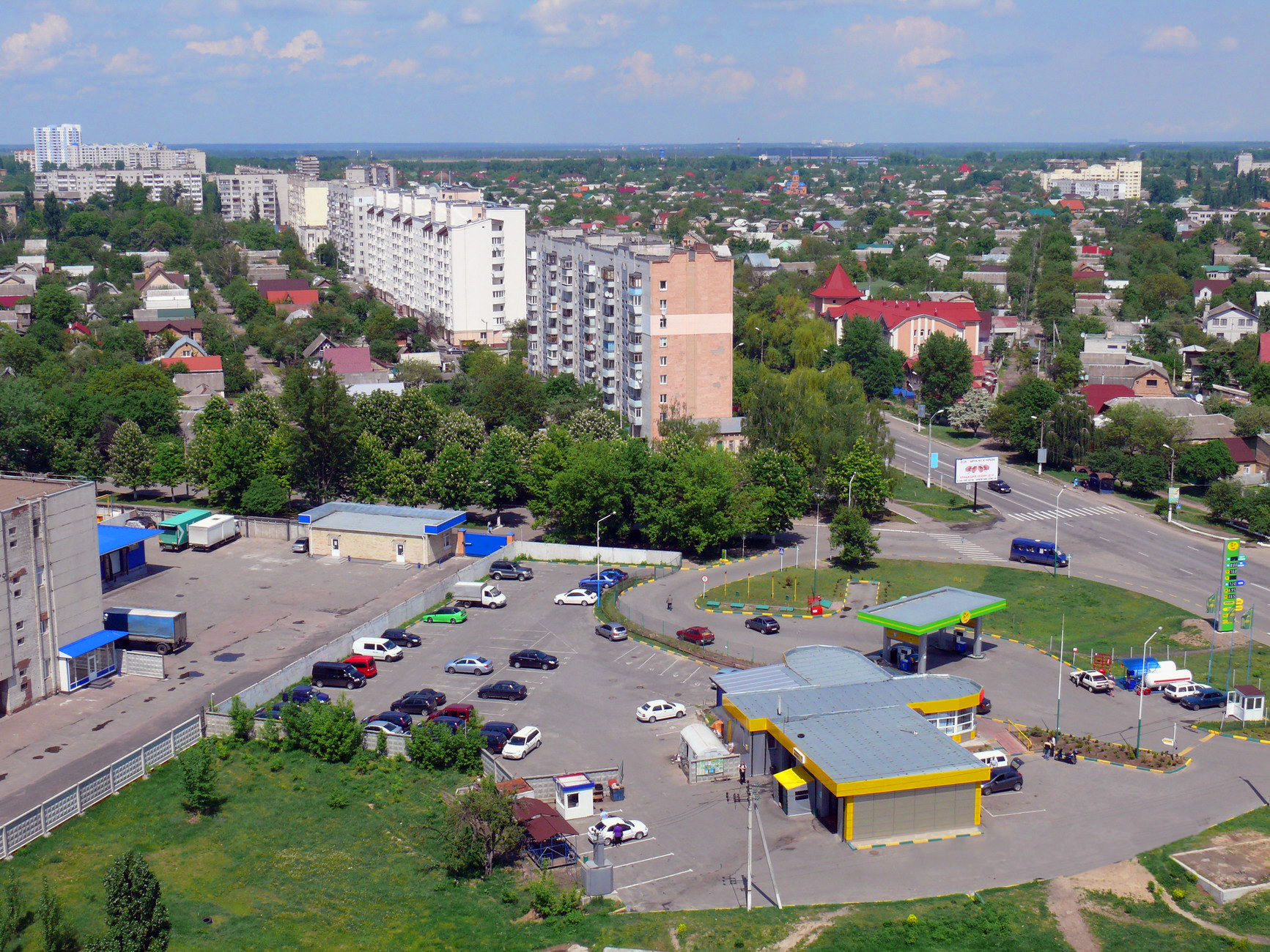 Перекресток улиц Белогородской и 40 лет Октября. Вид с крыши здания бывшего завода «Искра»